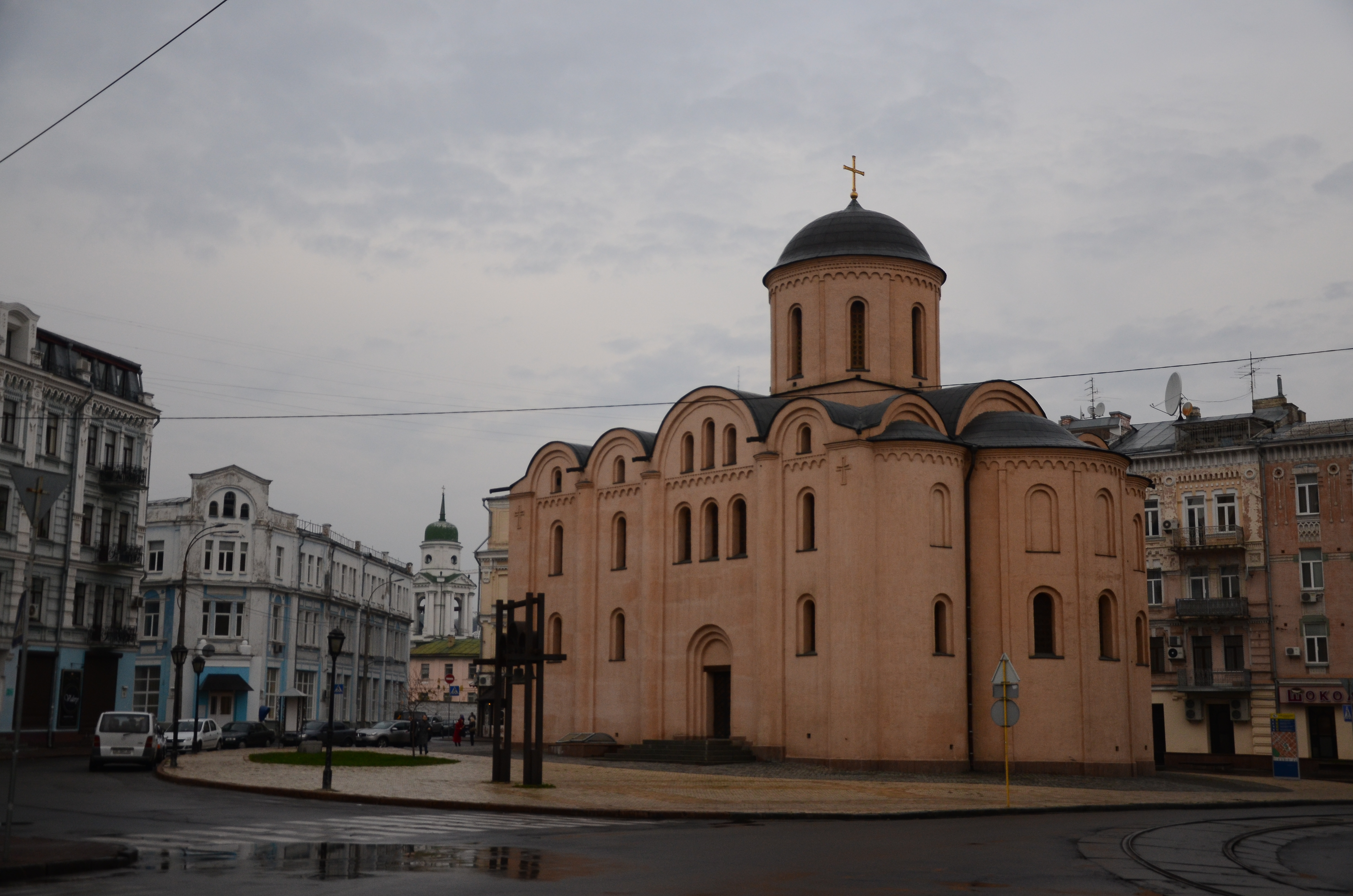 Храм Успения Богородицы Пирогощи в Киеве.